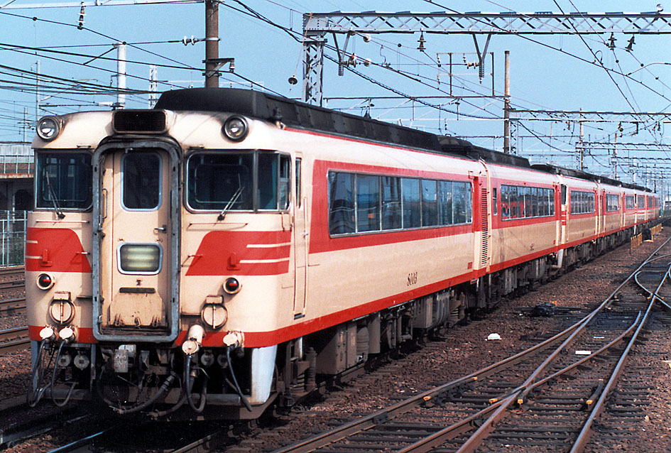 名古屋鉄道 キハ8000系特急回送